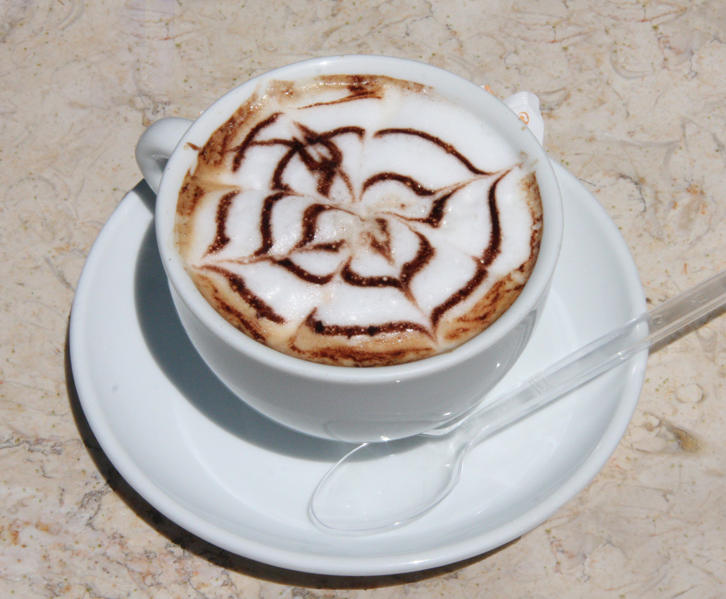 Cappuccino